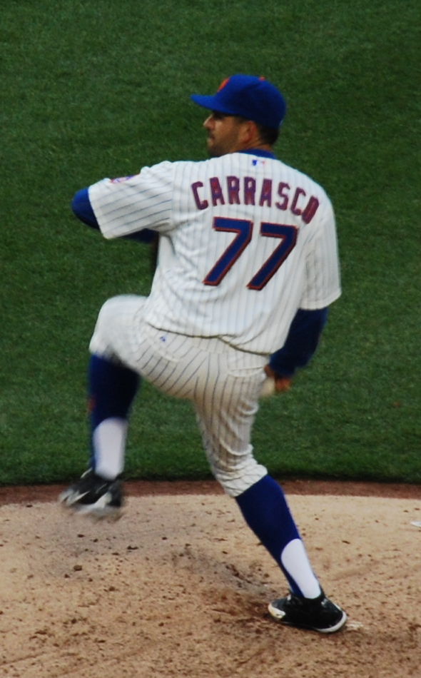 D. J. Carrasco